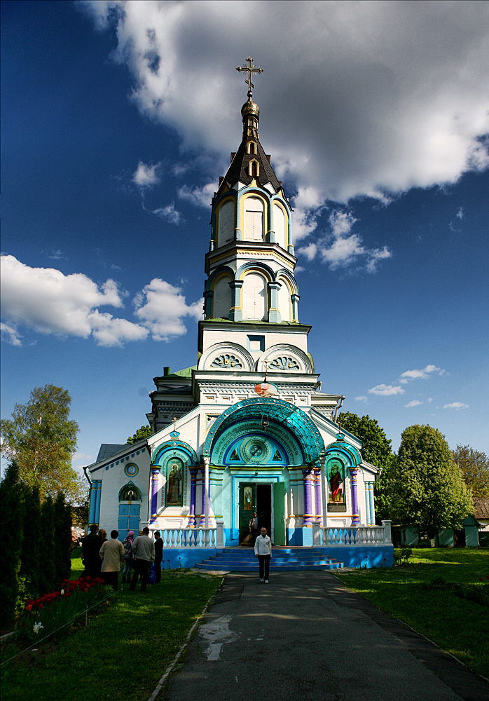 Свято-Ильинский Храм в г. Чернобыле